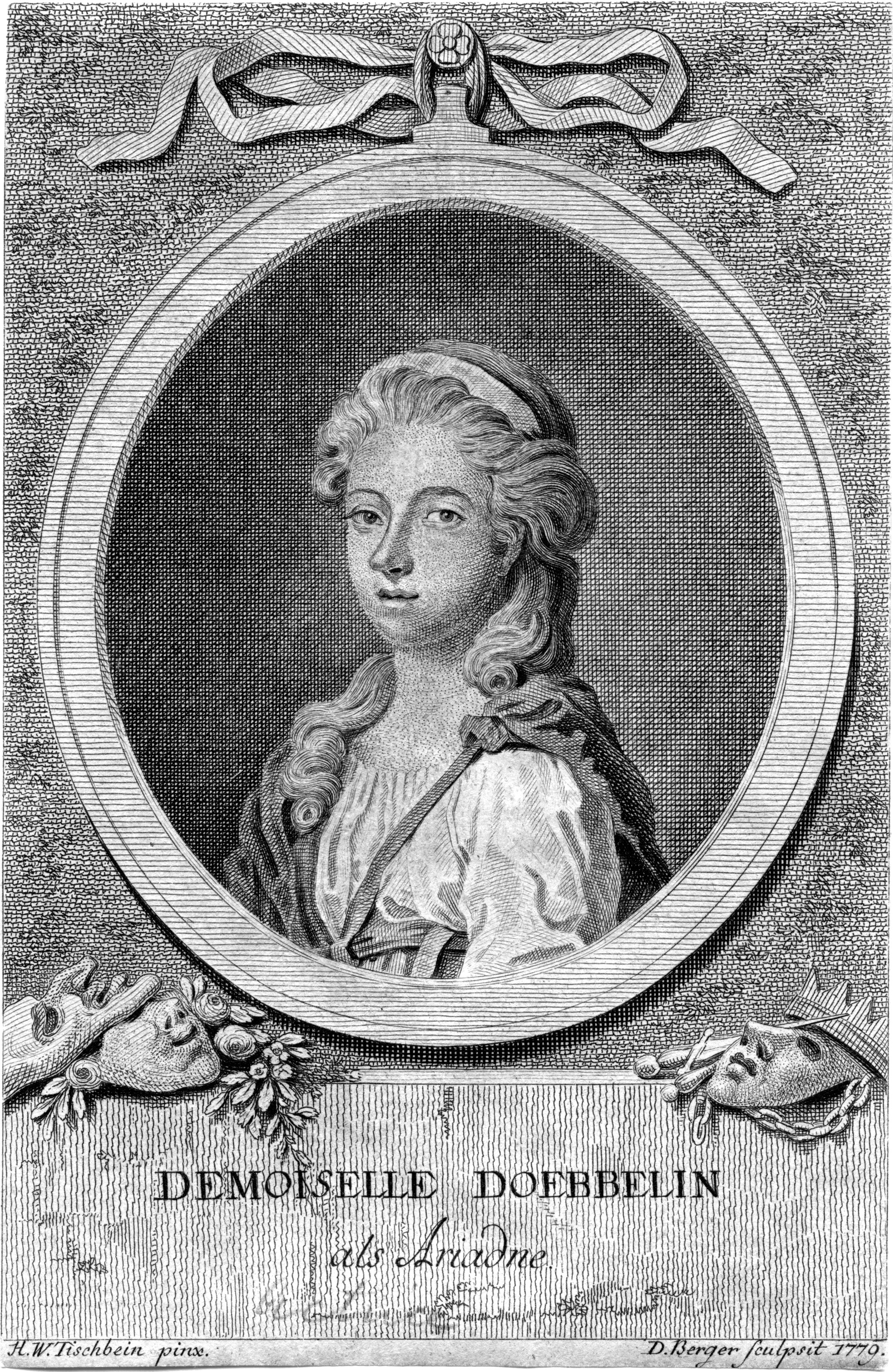 Portrait gravé